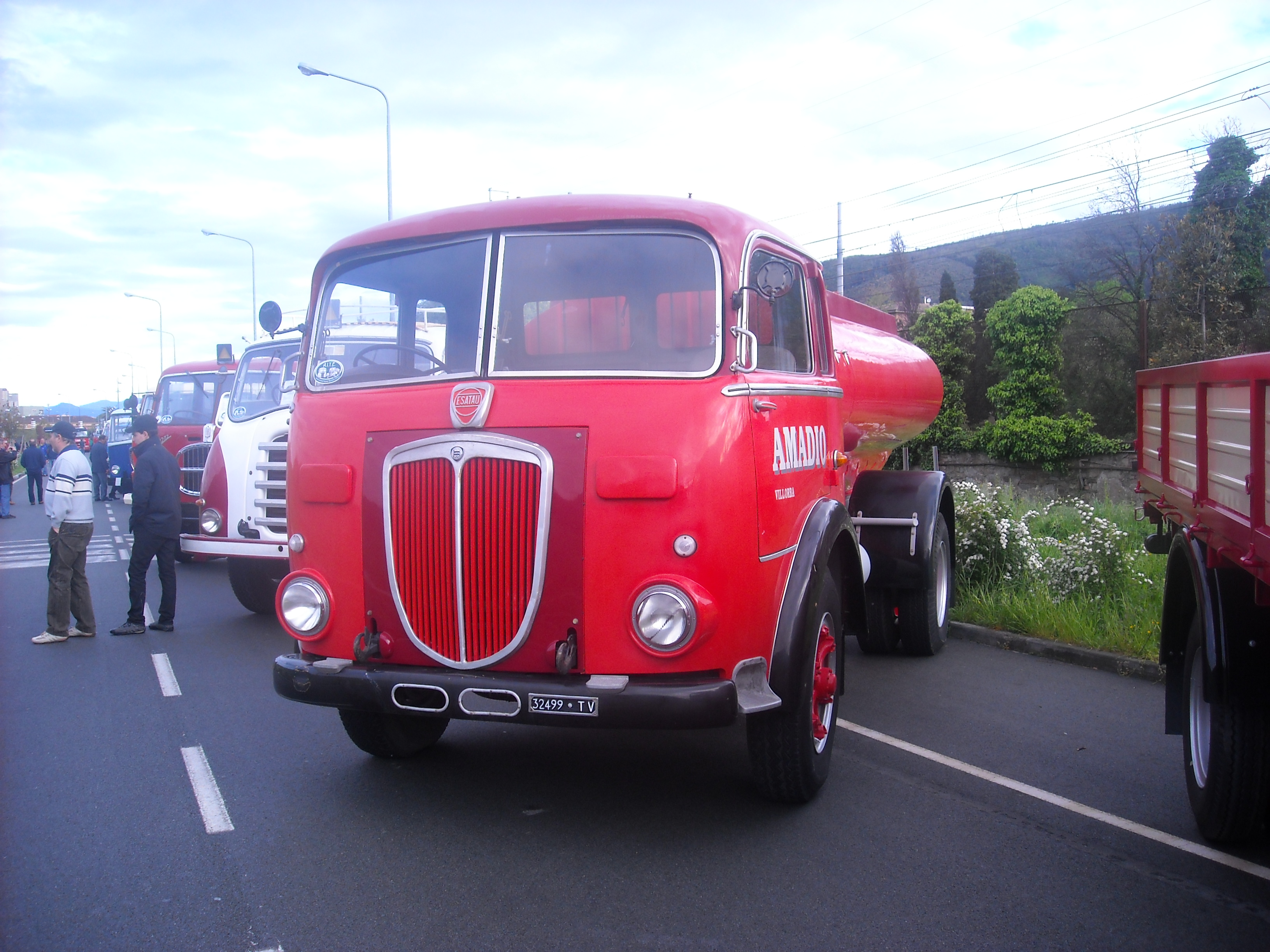 Autocarro Lancia Esatau A